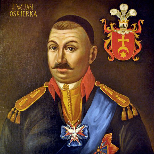 Беларуская (тарашкевіца): Партрэт Яна Мікалая Аскеркі (Jan Askierka), дзяржаўнага дзеяча Вялікага Княства Літоўскага; стражніка польнага, пасла Чатырохгадовага Сойму, удзельніка паўстаньня 1794 году.